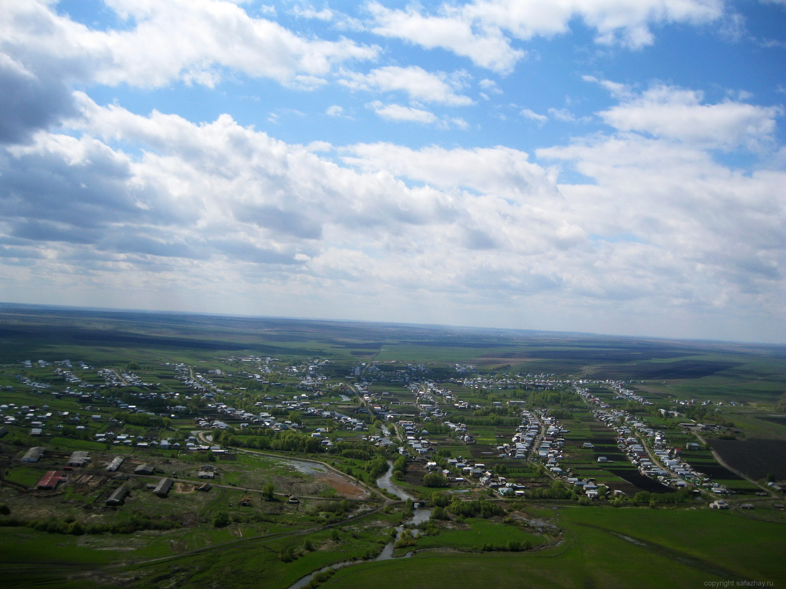 Сафаҗай панорама